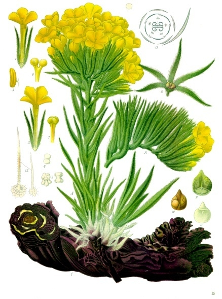 Arnebia densiflora. A blühende Pflanze. B ein Fruchtzweig. C die Wurzel einer alten Pflanze. 1 Blüte der langgriffeligen Form im Längsschnitt; 2 Blüte der kurzgriffeligen Form im Längsschnitt; 3 Staubblatt; 4 trockener Pollen; 5 Pollen in Wasser; 6 Narbe der langgriffeligen und 7 Narbe der kurzgriffeligen Blüte; 8 Fruchtkelch geöffnet; 9 Frucht von der Bauchseite; 10 Samen von aussen; 11 Samen im Längsschnitt; 12 Haare; 13 Diagramm der Blüte.